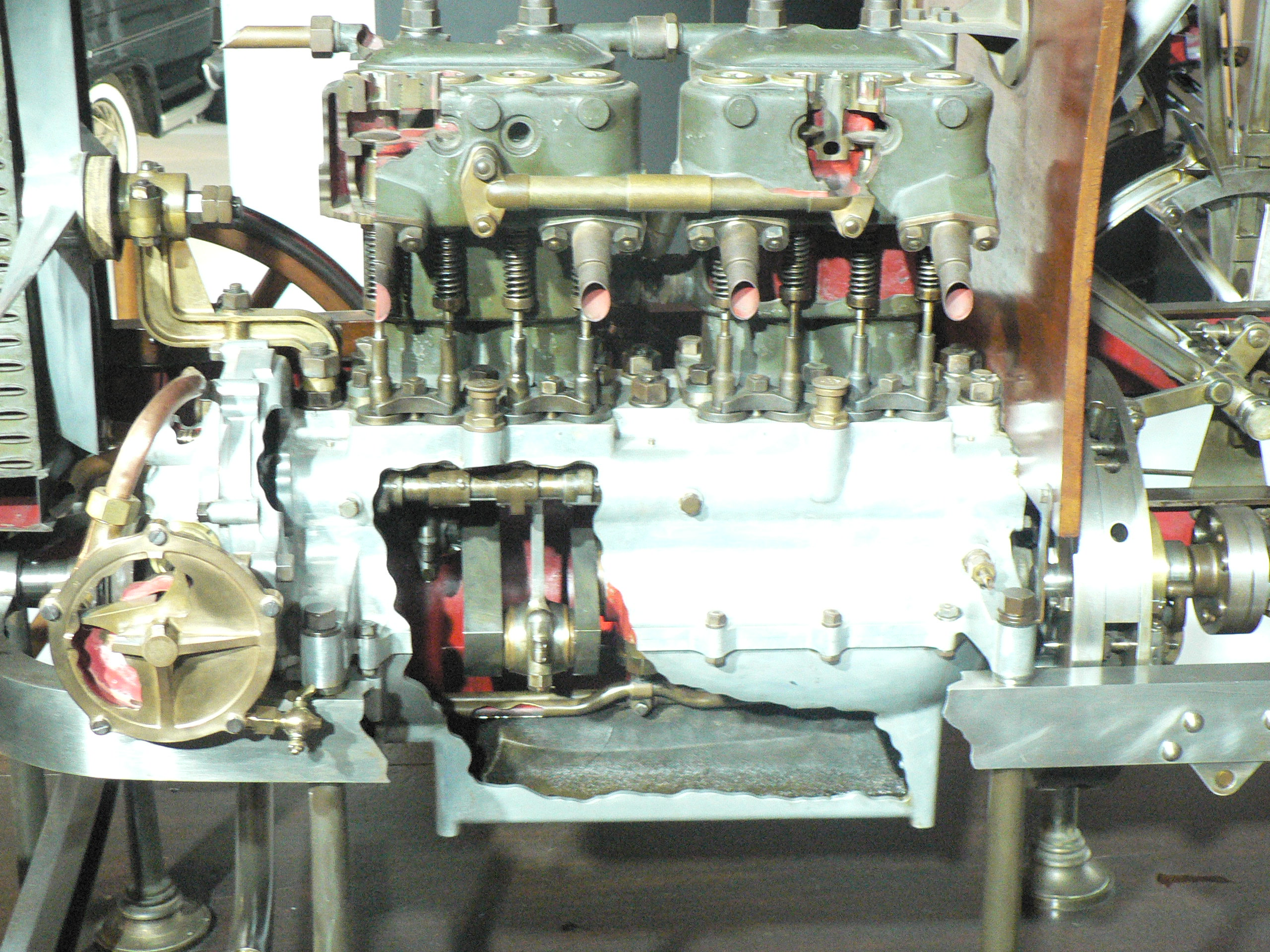 Description